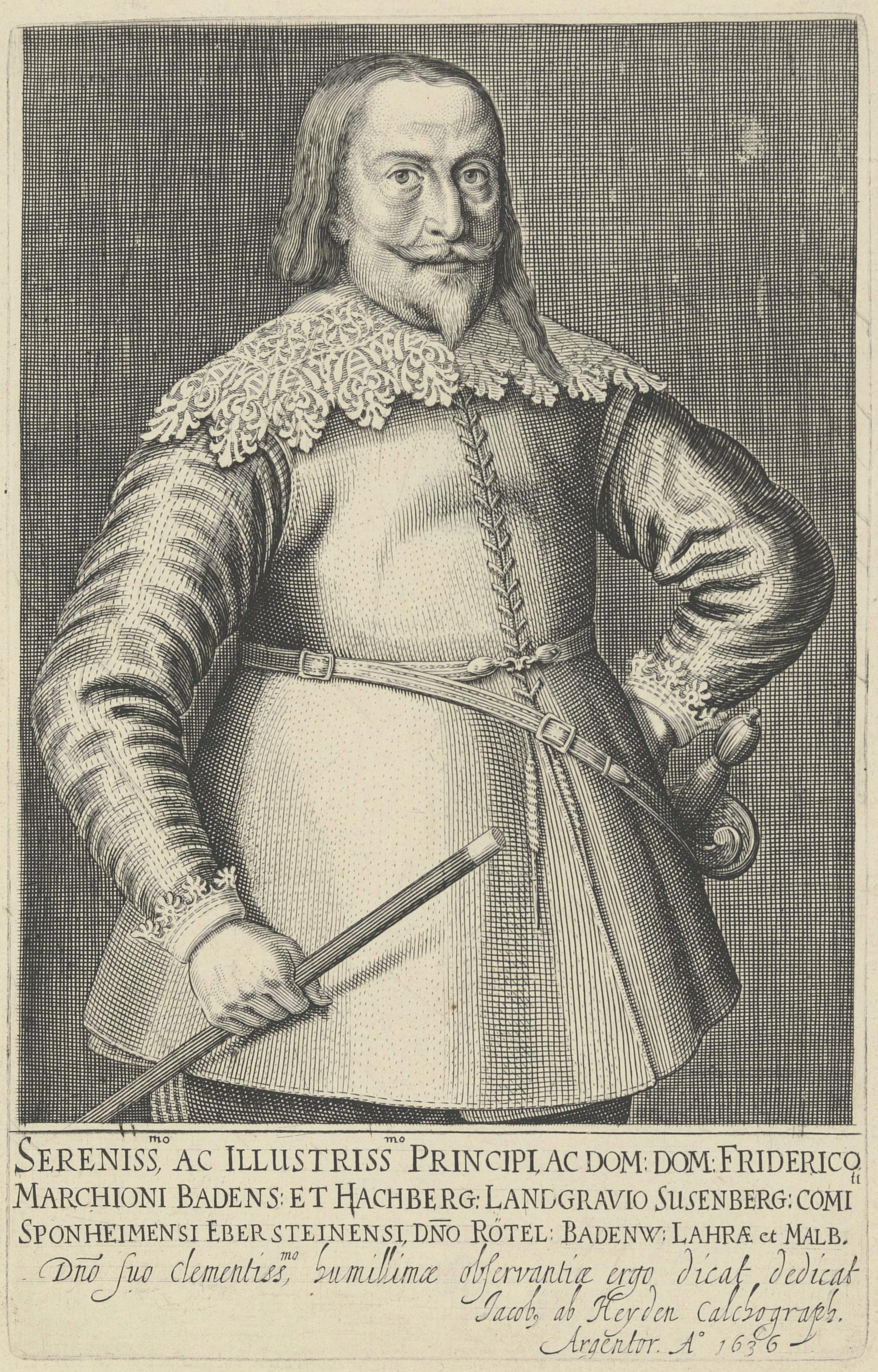 Markgraf Friedrich V. von Baden-Durlach (1594-1659)